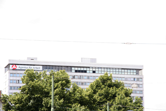 Blick über das Präsidium und die Bäume auf das Gebäude des Arbeitsamtes Kassel.